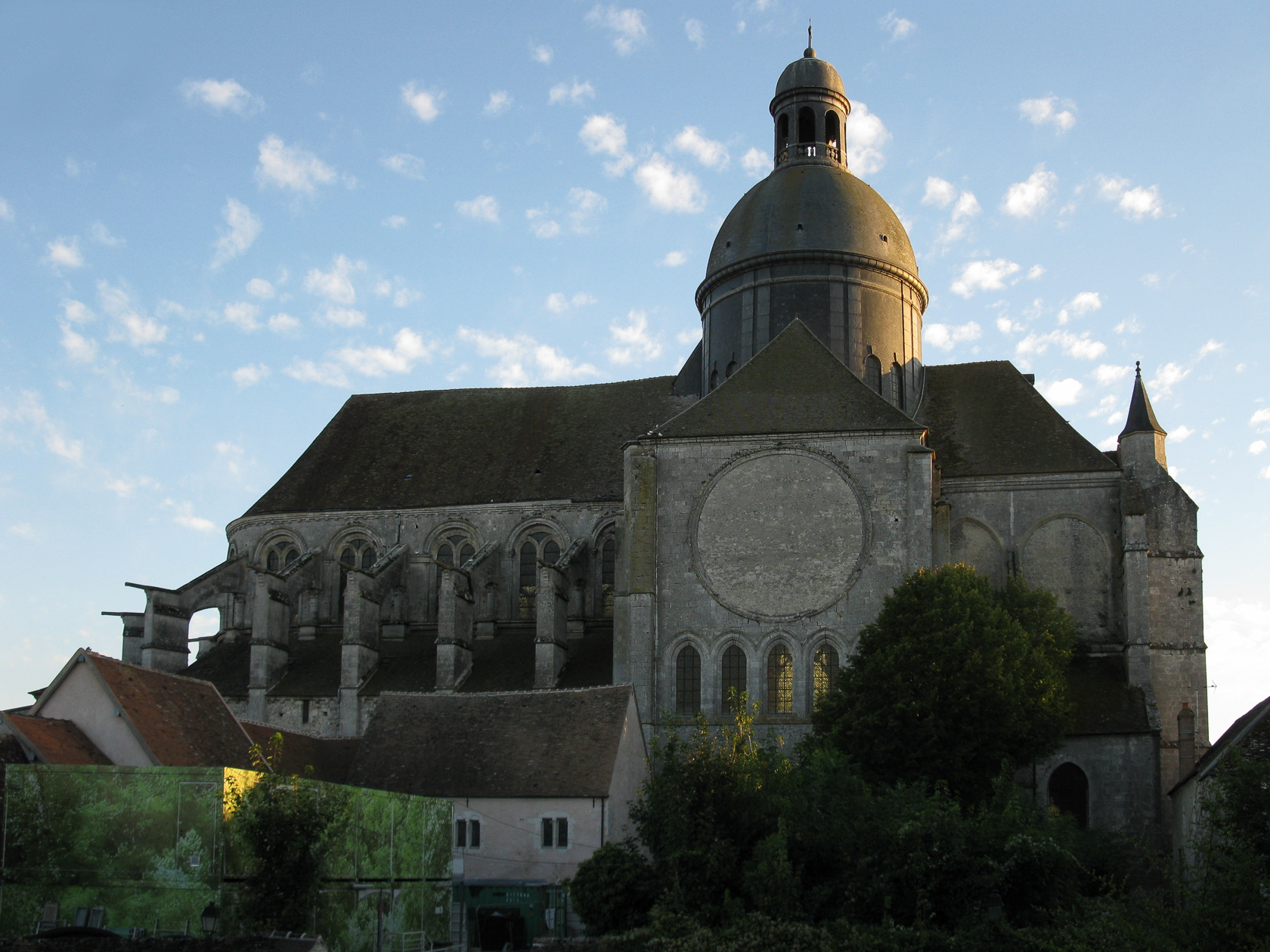 Collégiale Saint-Quiriace (Classé) .